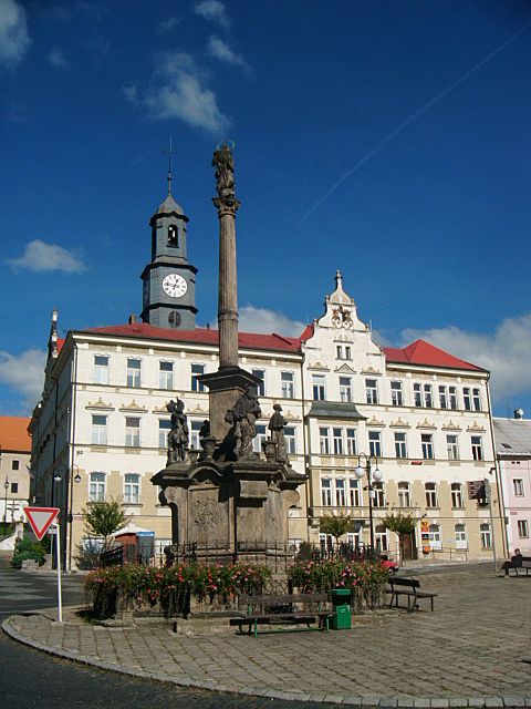 Sloup se sochou P. Marie (Benešov nad Ploučnicí), Benešov nad Ploučnicí